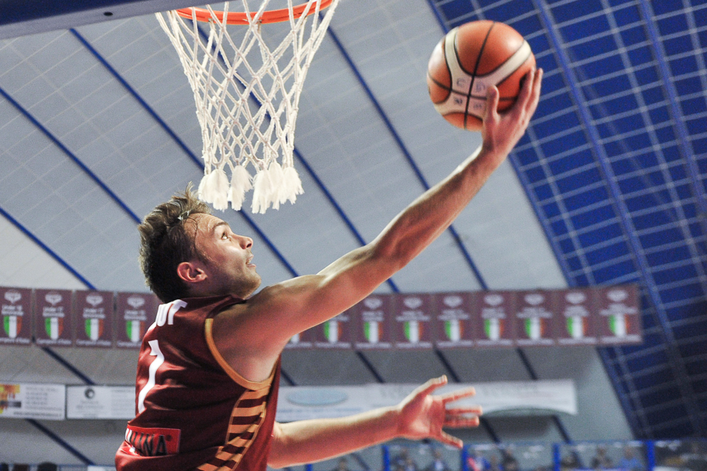 Stefano Tonut con la maglia della Reyer Venezia